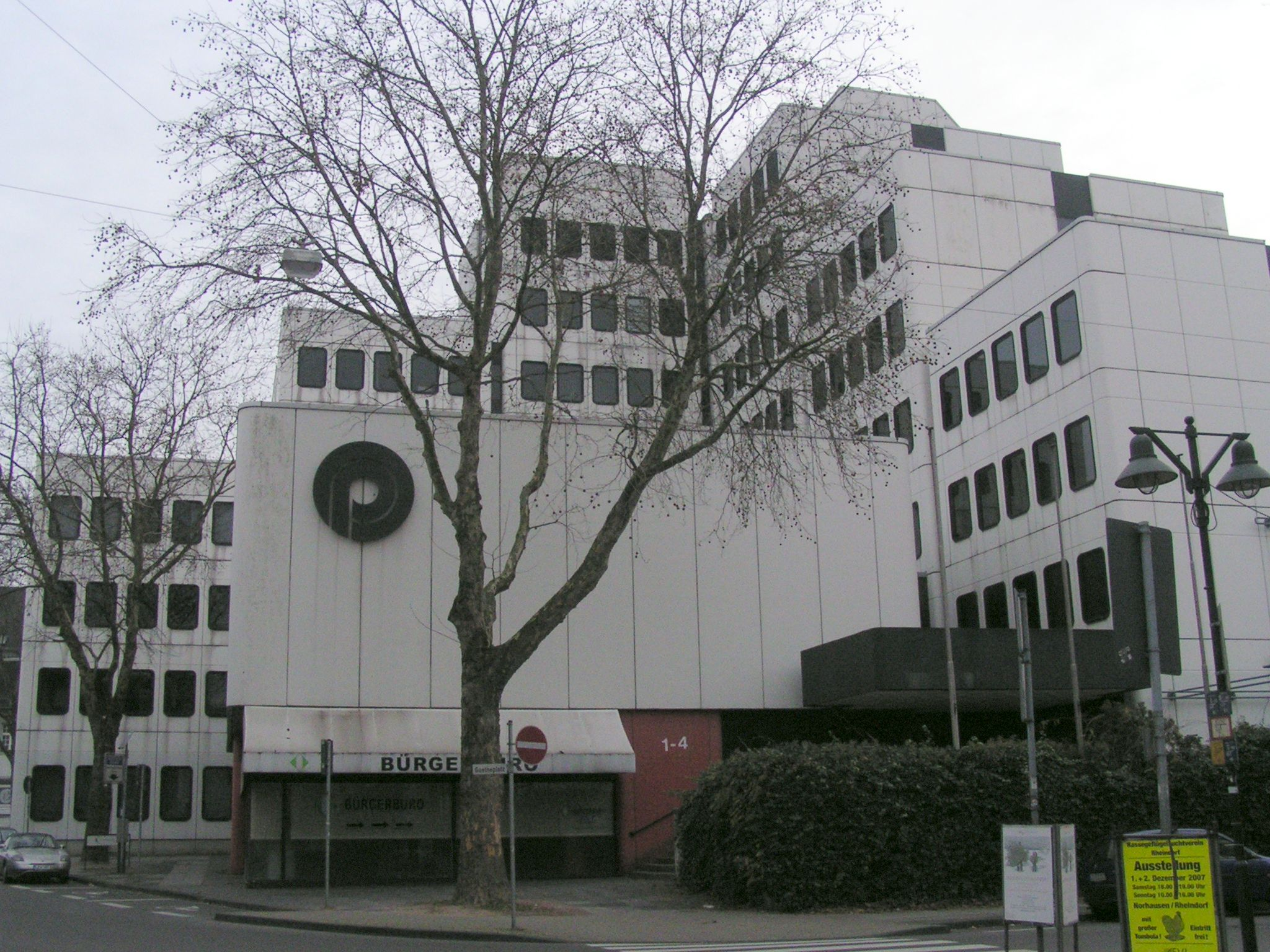 Verwaltungsgebäude in Leverkusen-Opladen. Das Gebäude wurde 1974 unmittelbar vor der Eingemeindung von Opladen nach Leverkusen als Opladener Rathaus errichtet; es fand jedoch nur eine einzige Sitzung des Opladener Stadtrats im Dezember 1974 dort statt.